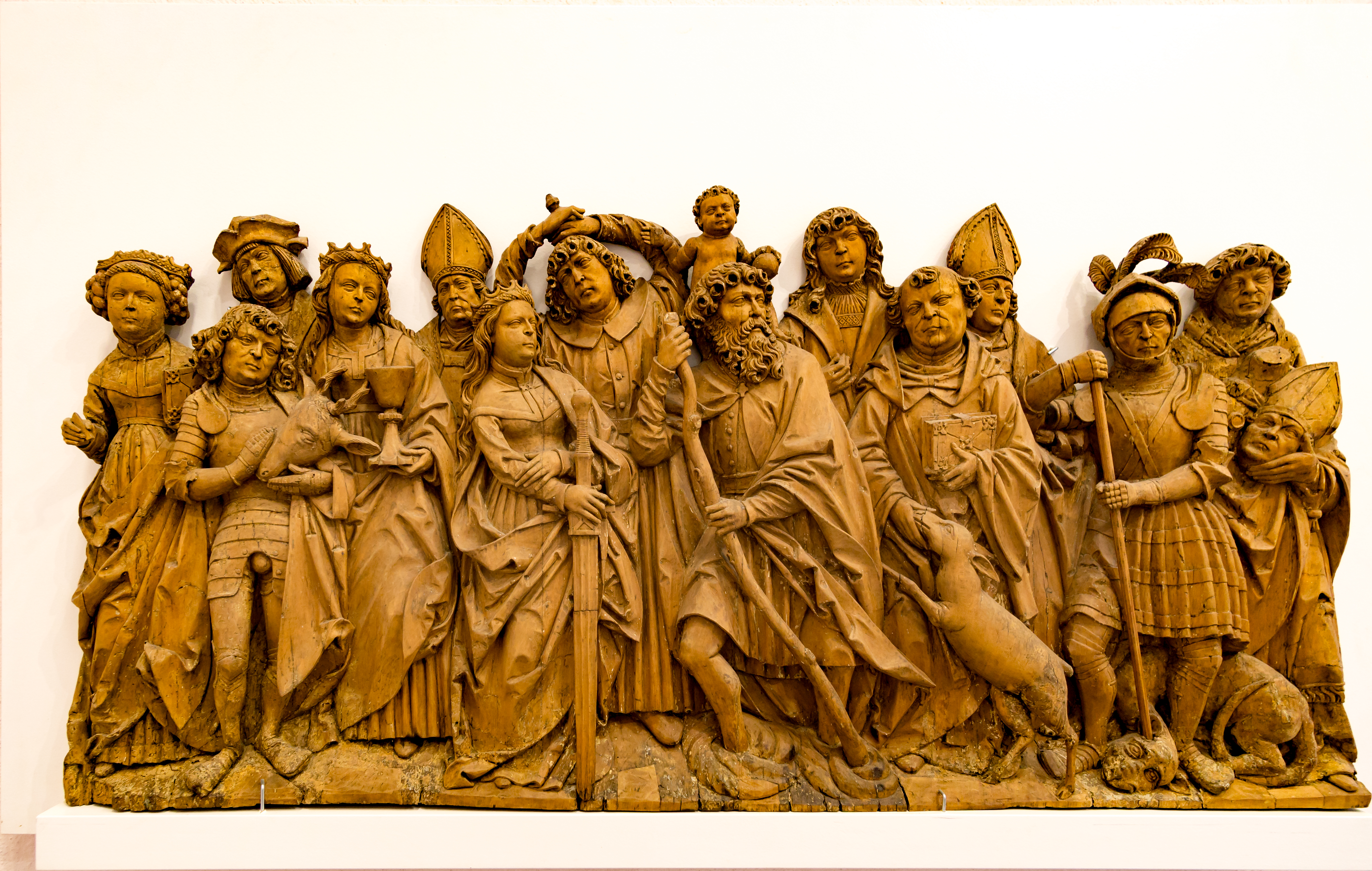 Umkreis Tilman Riemenschneider